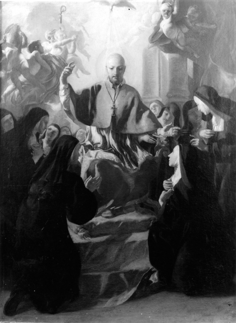 La Gloire de saint François de Sales